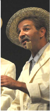 יוסי עיני בהצגה הקסם הגדול